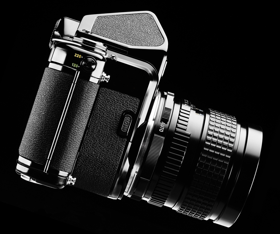 Pentax 6x7 Camera